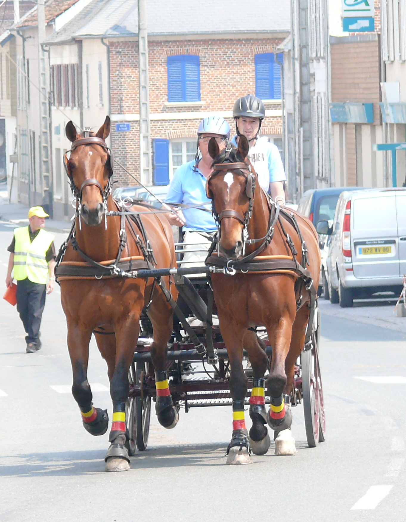 Passage d'un des concurents du concours d'attelage international organisé à Conty du 25 au 29 avril 2007 (ici : épreuve de marathon)